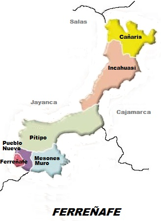 Mapa Politico Ferreñafe